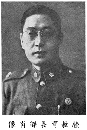 滕傑